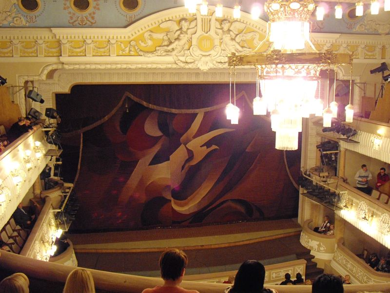 Основная сцена симферопольского театра